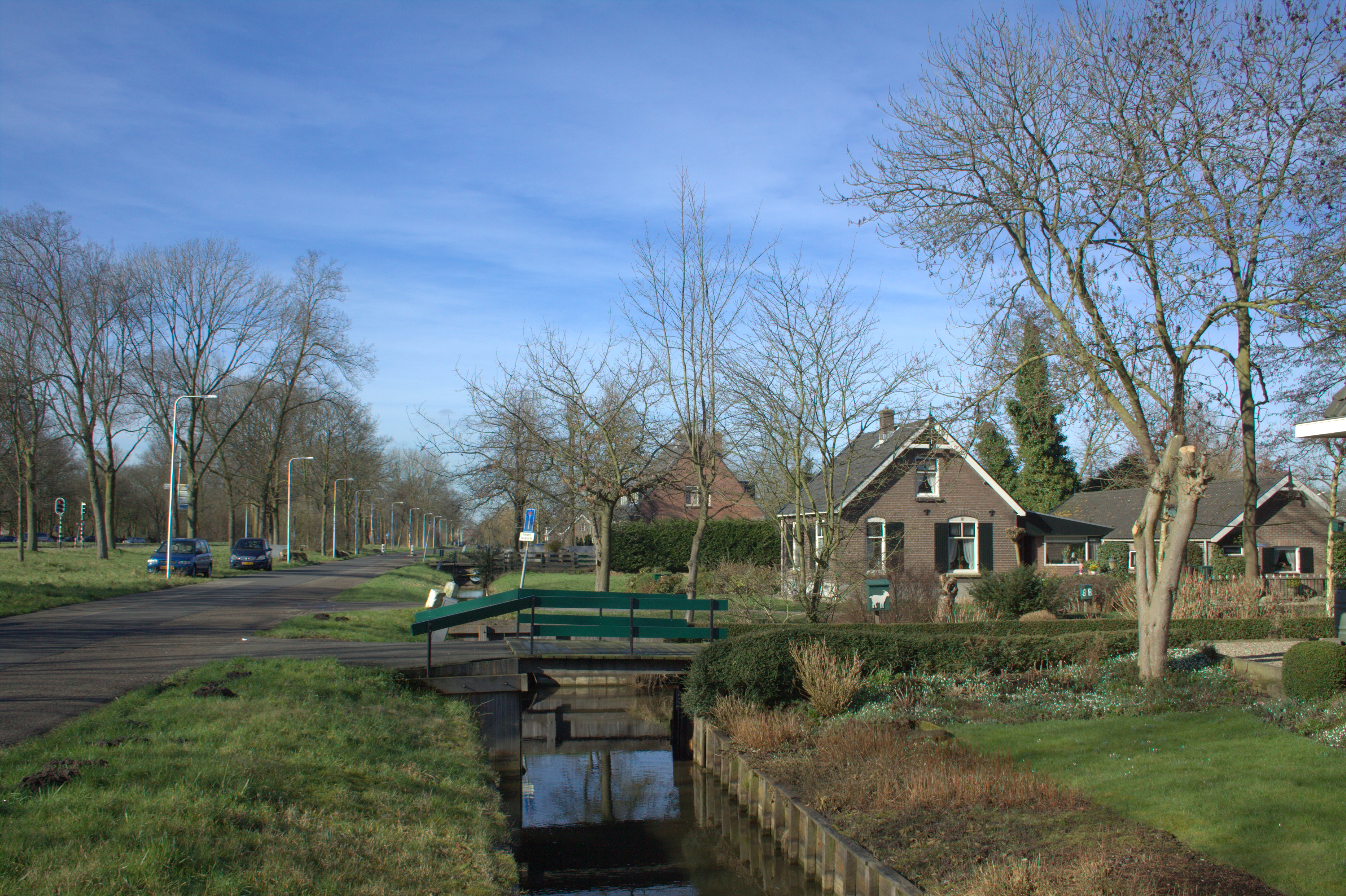 De Gageldijk was vroeger een en al boerderijen met daar achter uitgestrekte weilanden. En nu nog heeft de dijk een landelijk karakter.